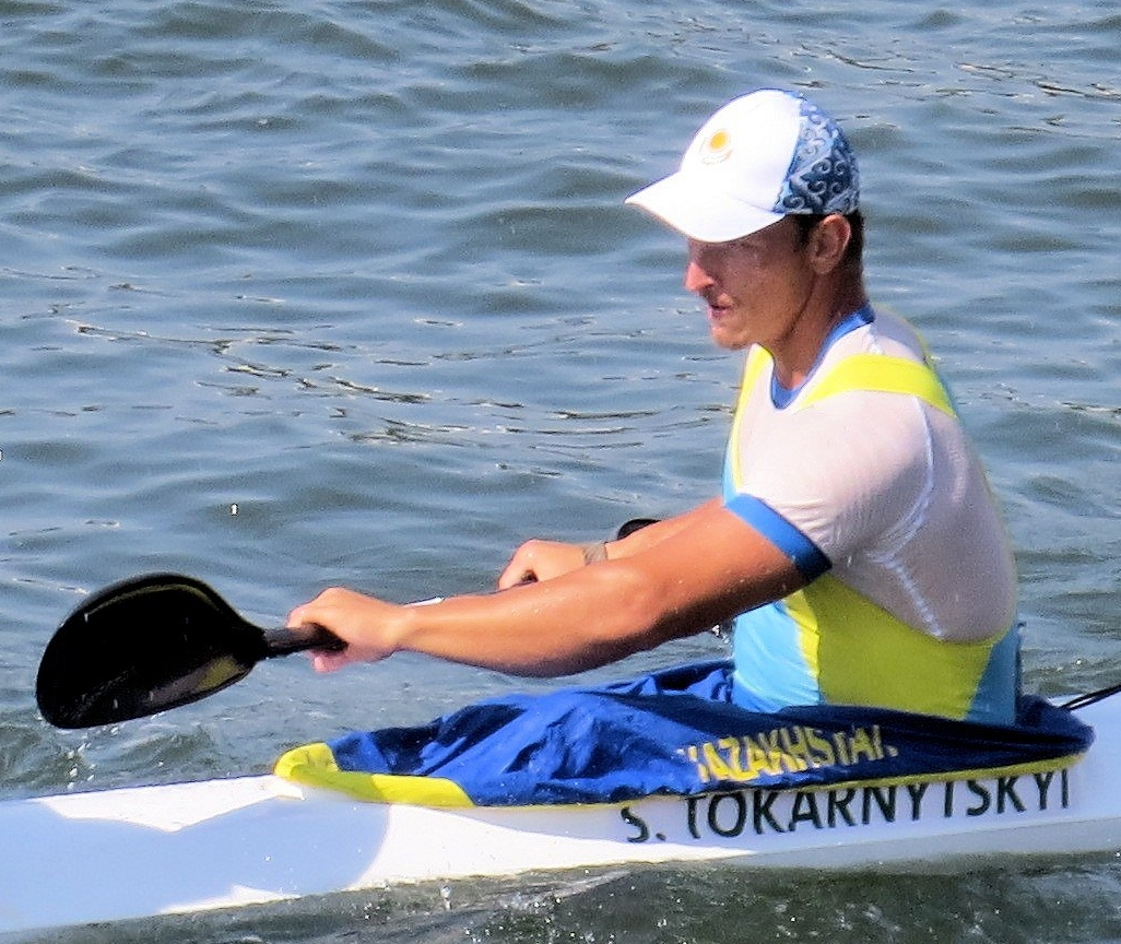 Sx50